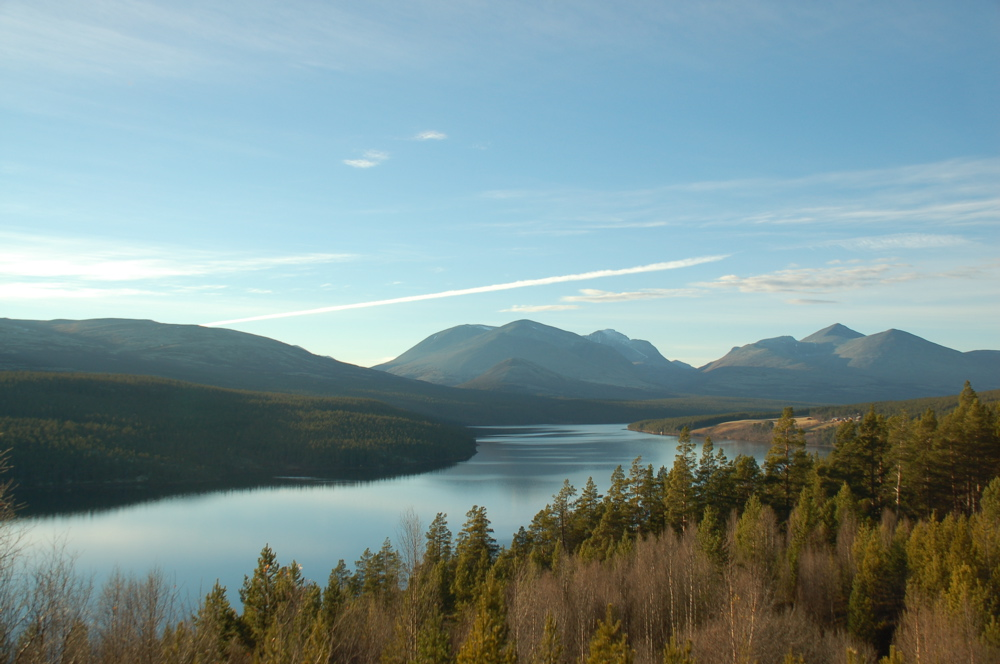 Utsikt mot Rondane fra Sohlbergplassen. Fra venstre mot høyre: Blåkollen, Illmanndalen, Storronden, Rondvasshøgde, Rondslottet, Langglupdalen, Søre Oksle, Høgronden, Storsvulten.